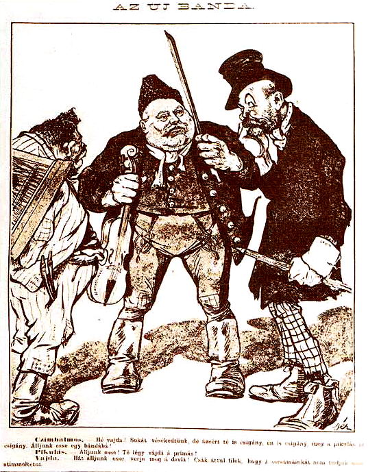 Eötvös Károly és politikustársai karikatúrája